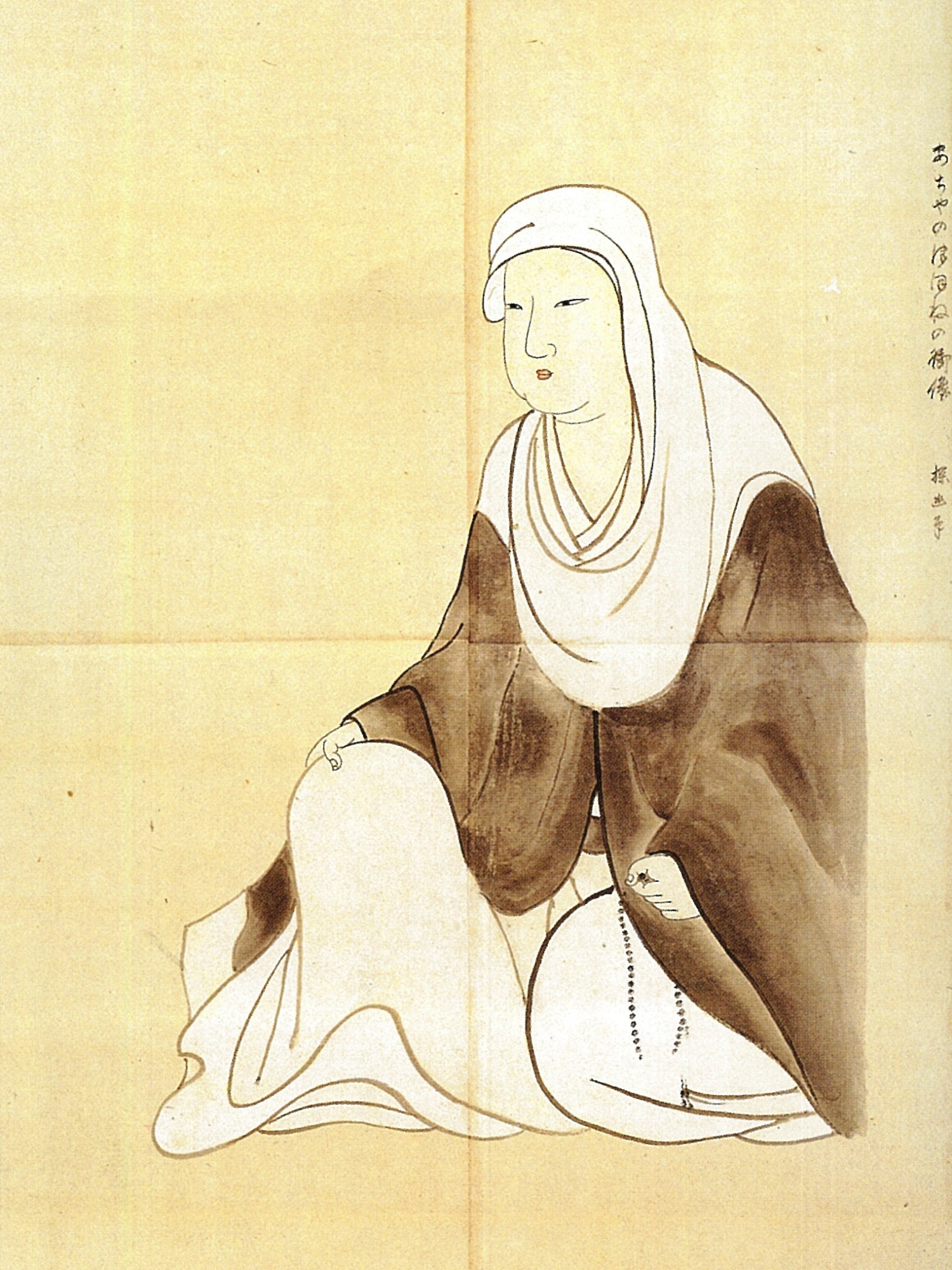 徳川家康の側室・阿茶局 (1555 - 1637)の肖像画